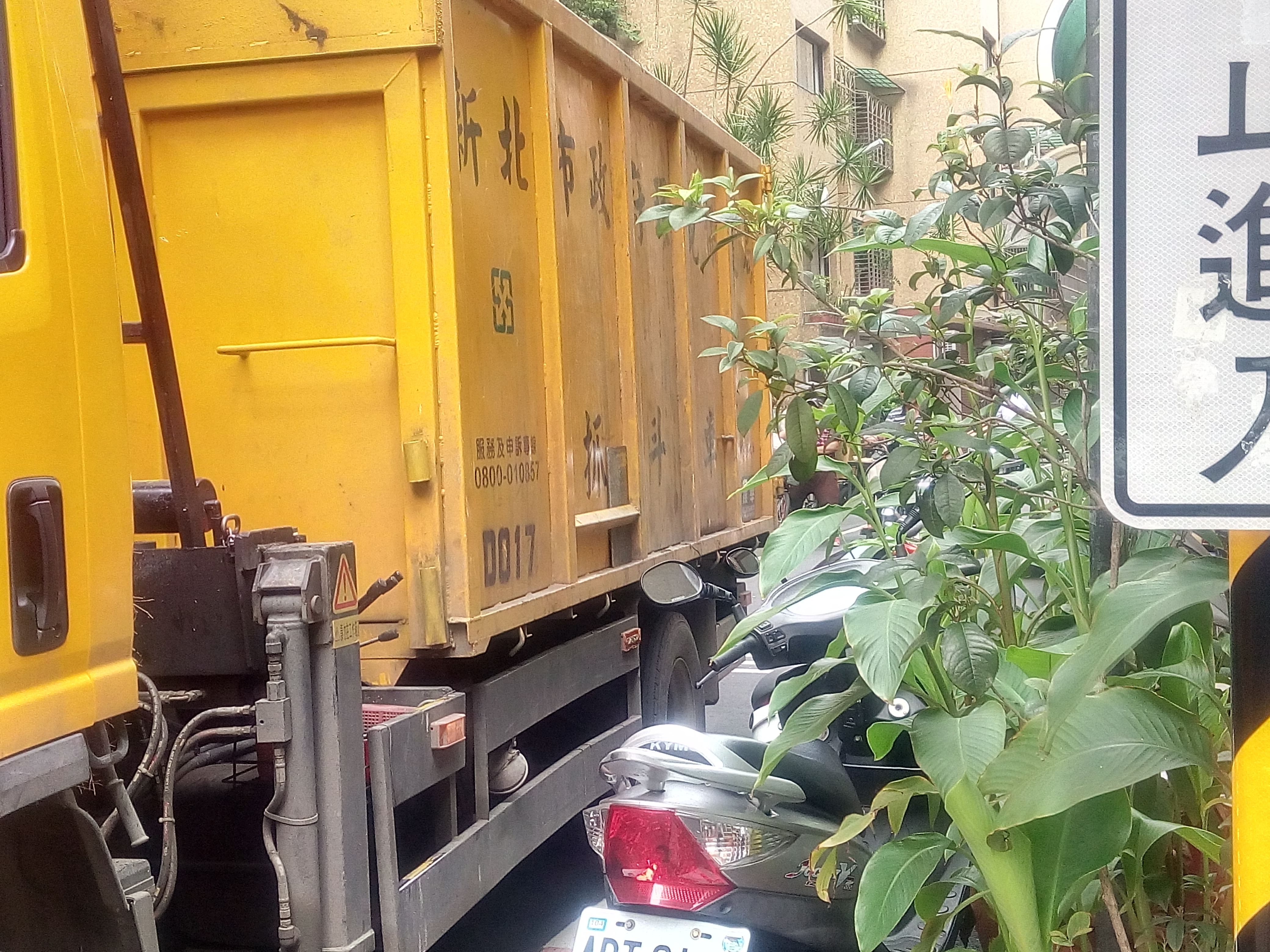 新北市政府環境保護局抓斗車車廂